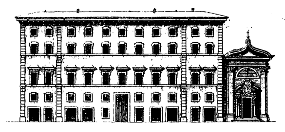 Palazzo Ferrajoli, disegno di Giovanni Battista Cipriani.